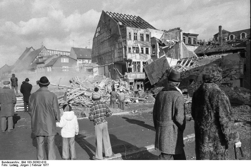 Erfurt, Abbrucharbeiten ADN-ZB/Ludwig/2.3.77/Erfurt: Die umfassende Rekonstruktion des Erfurter Stadtzentrums am Anger wird von allen beteiligten Baukollektiven zügig weitergeführt. Kulturhistorisch wertvolle Häuser werden komplex restauriert, nicht mehr erhaltungswürdige Gebäude wie hier in der Neuwerkstraße fallen der Spitzhacke zum Opfer. Nach dem Abbruch werden sich neue Gebäude harmonisch in die Gesamtkonzeption der historischen Geschäftsstraße einfügen.